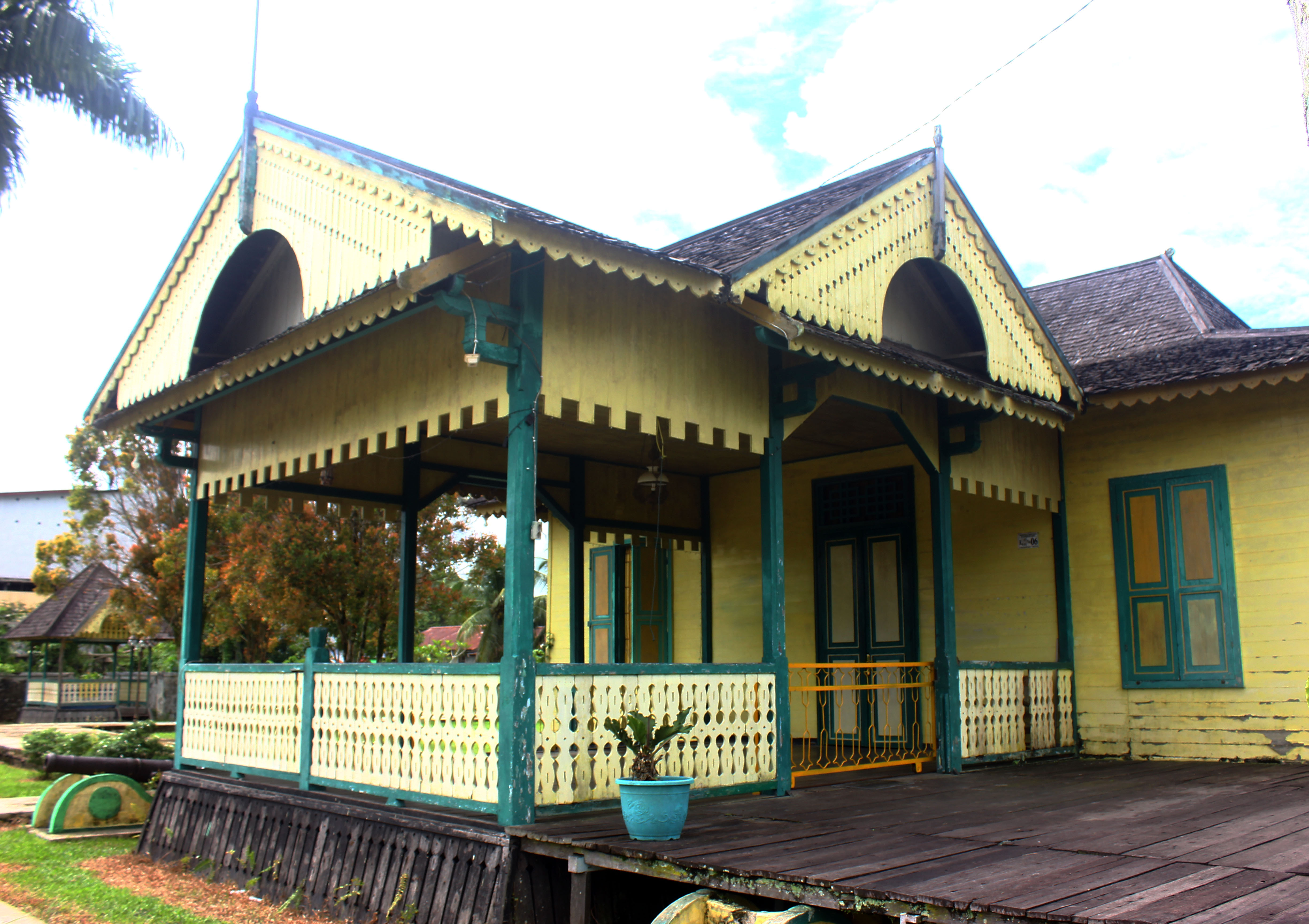 Keraton Ismahayana Landak merupakan Keraton Kerajaan Landak, yang terletak di Ngabang, Kab. Landak, Prov. Kalimantan Barat.